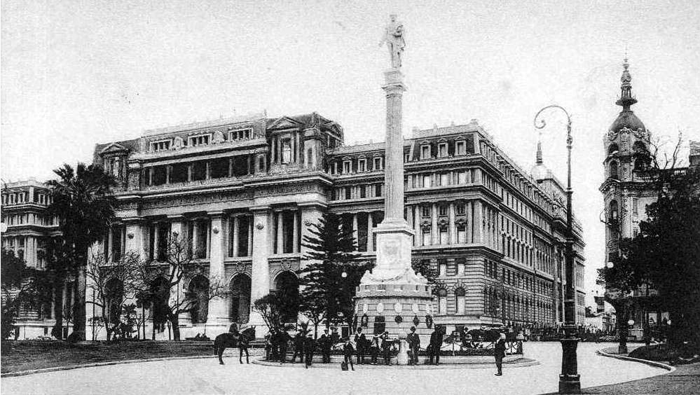 Vista de Plaza Lavalle y el Monumento a Juan de Lavalle sobre la calle Tucumán. A la izquierda, el Palacio de Tribunales aún sin terminar. A la derecha, el edificio conocido como Mirador Massue. Recién casados posan al pie del monumento.